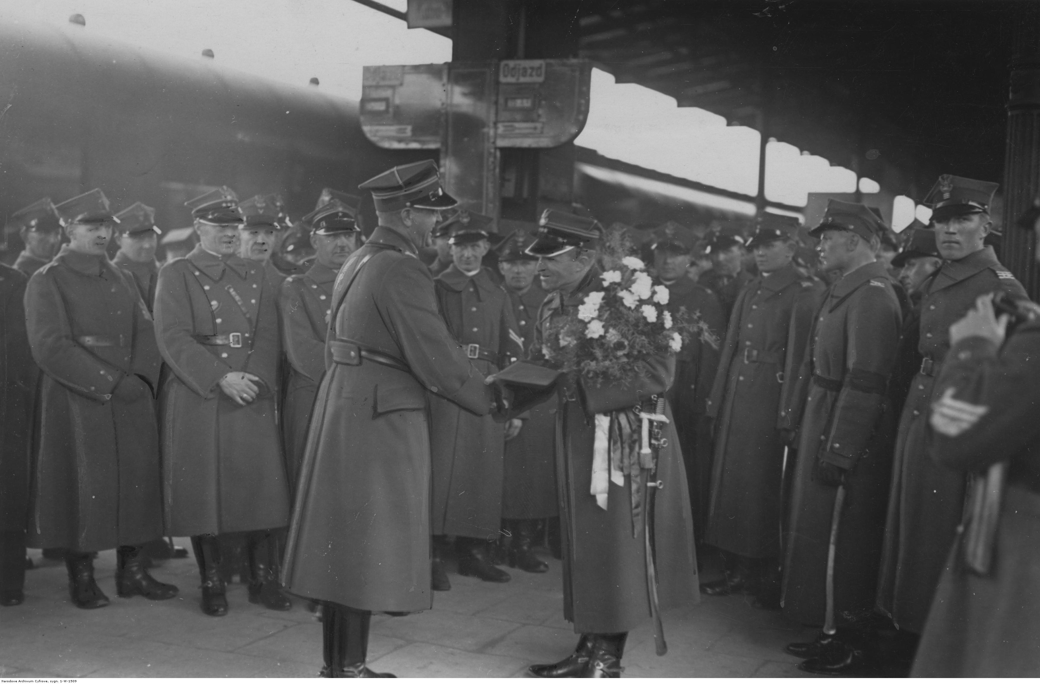 Pożegnanie dowódcy 14 Pułku Artylerii Lekkiej w Poznaniu. Szef sztabu 14 Dywizji Piechoty mjr Jan Kobylański żegna na dworcu wieloletniego dowódcę 14 Pułku Artylerii Lekkiej płk. Michała Gałązkę, nowo mianowanego dowódcę 1 grupy artylerii. Koncern Ilustrowany Kurier Codzienny - Archiwum Ilustracji. Sygnatura: 1-W-1509